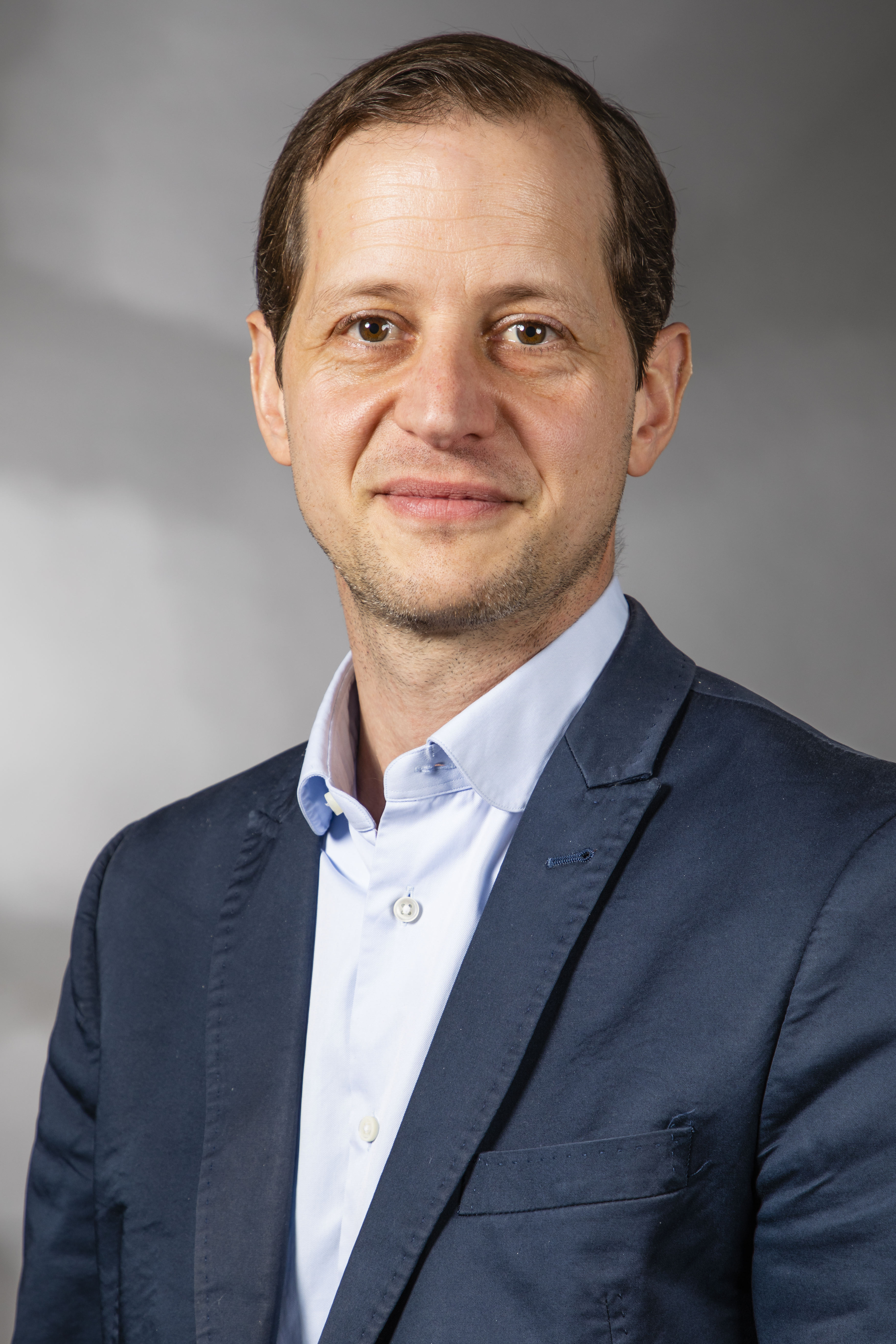 Roger Beckamp